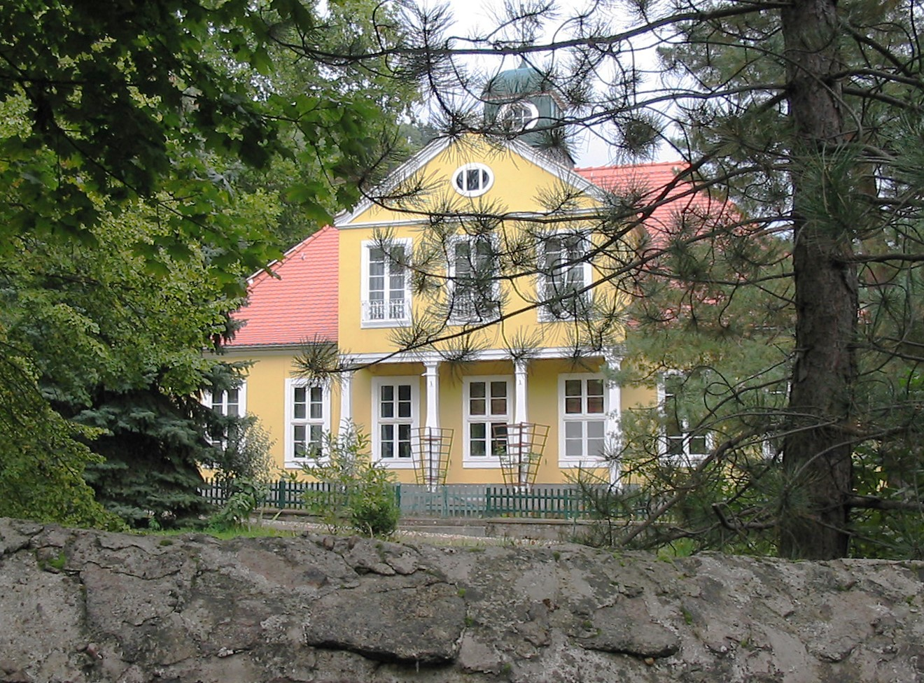 Grundhof (Radebeul), Paradiesstraße 58